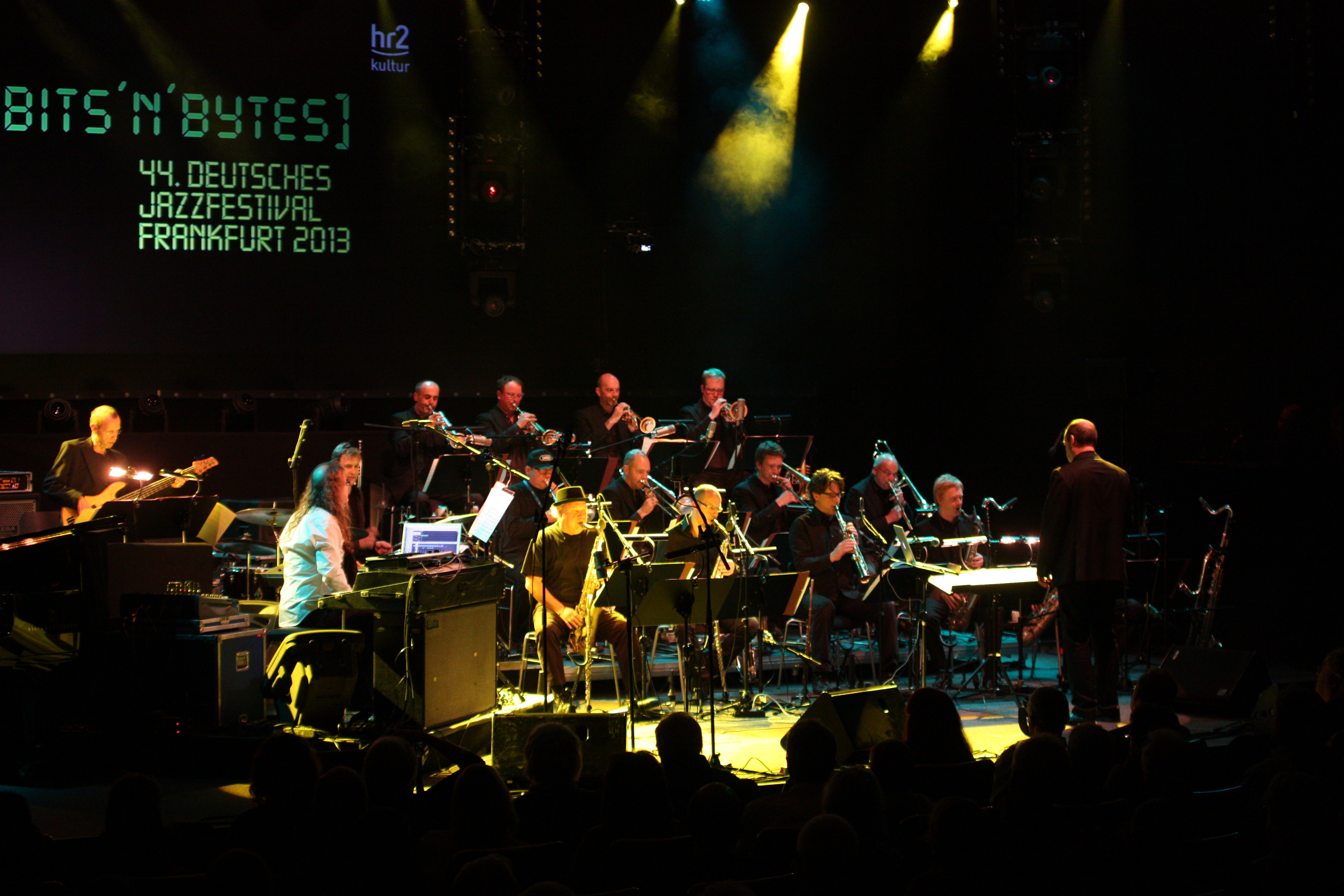 44. Deutsches Jazzfestival Frankfurt 2013: Die hr-Bigband